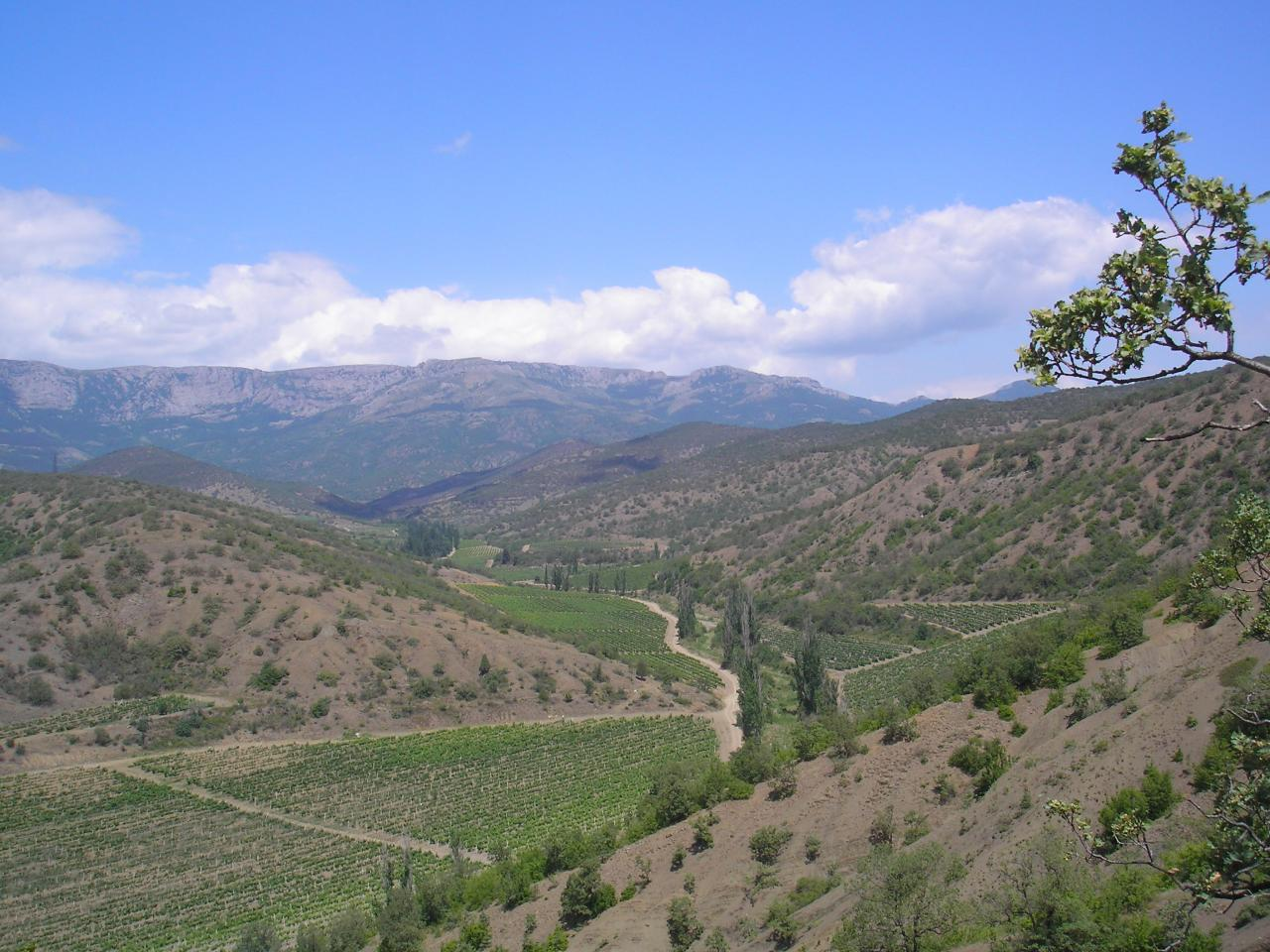 Долина реки Алачук, вид из Рыбачьего